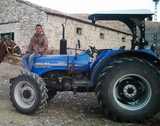 الاختيار الافضل جرار ام حصان